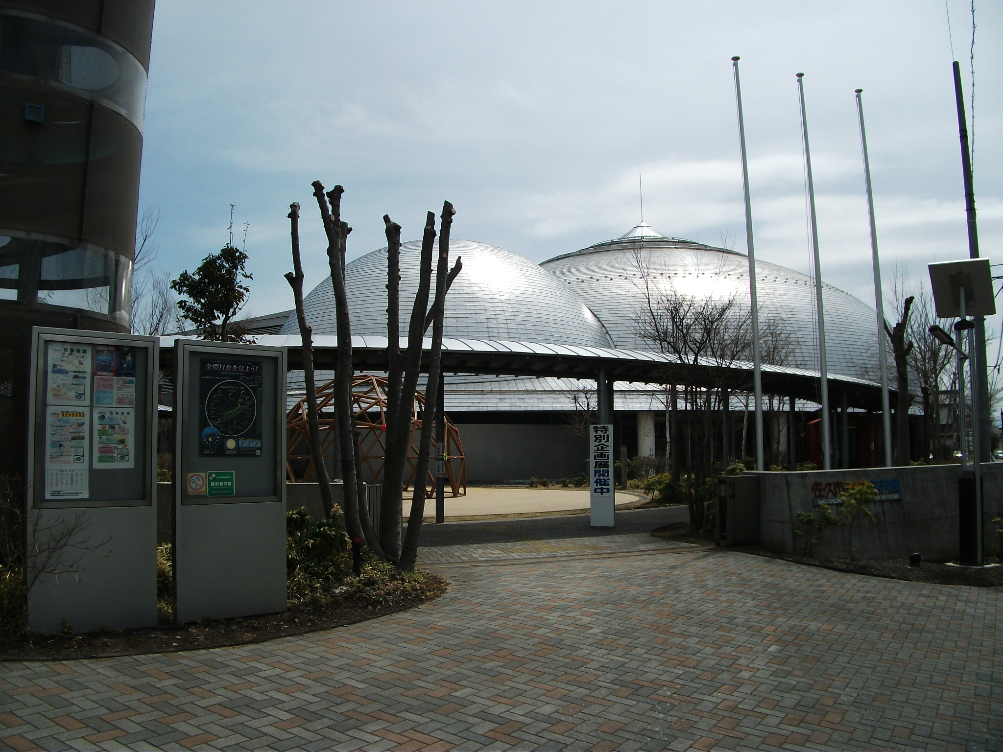 長野県佐久市、佐久市子ども未来館